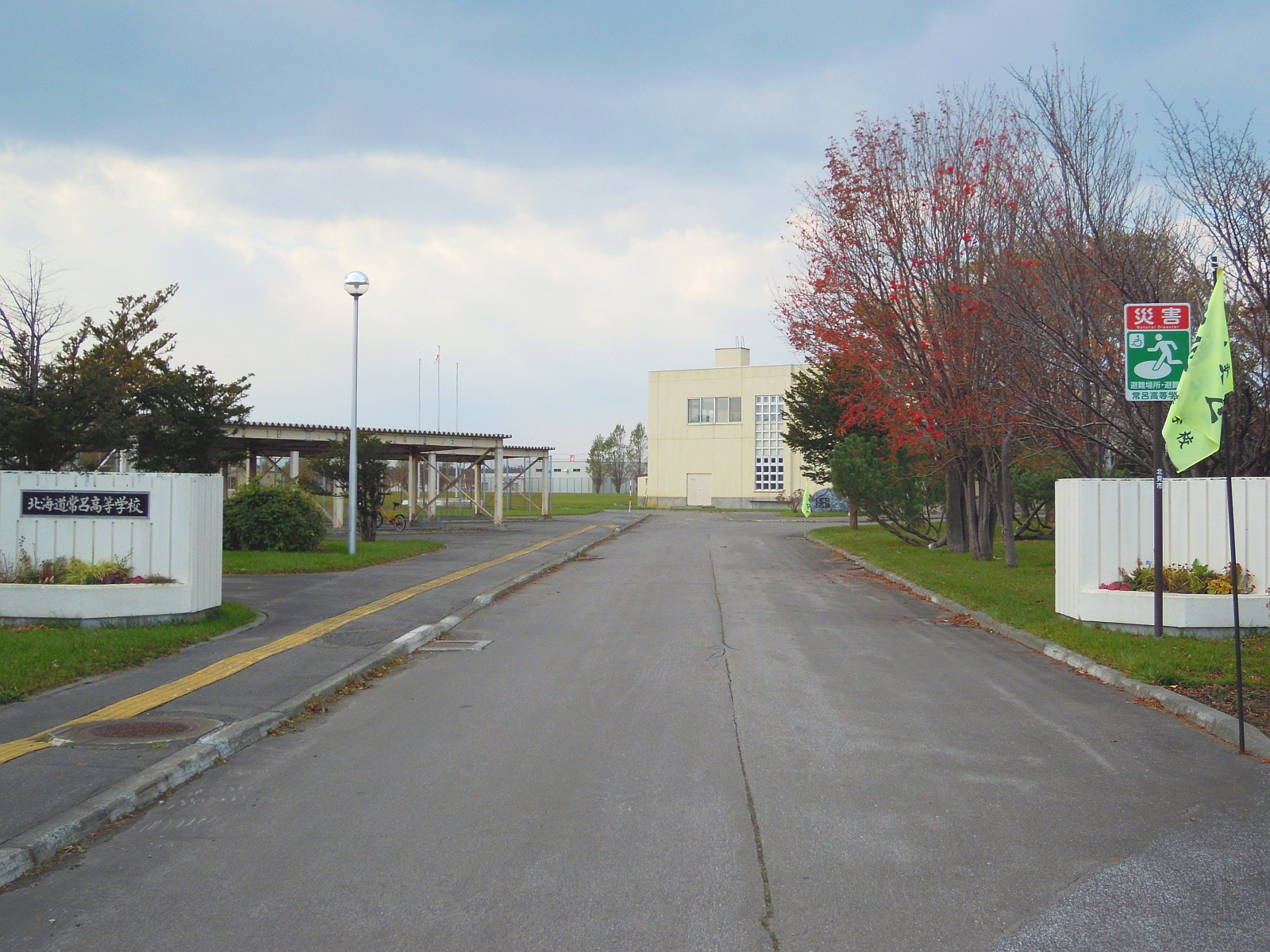 北海道北見市常呂町にある北海道常呂高校の校門。